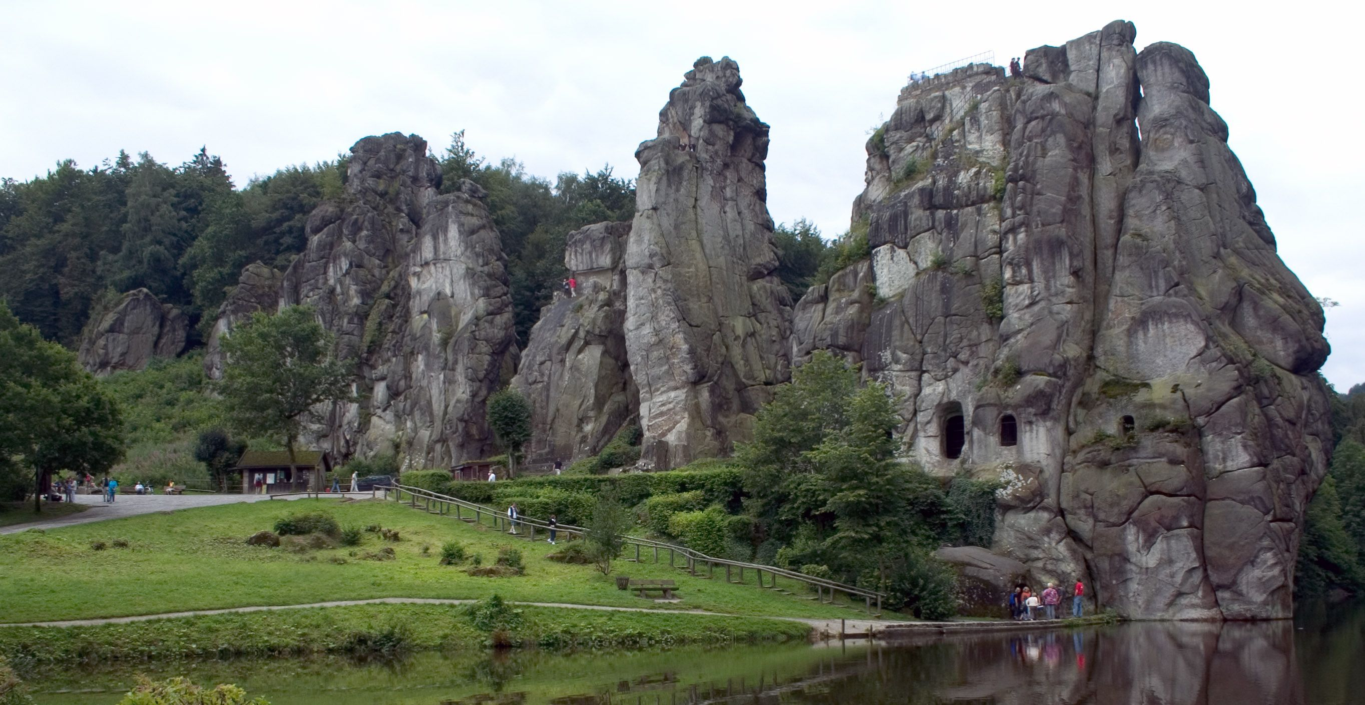 Die Externsteine bei Horn-Bad Meinberg